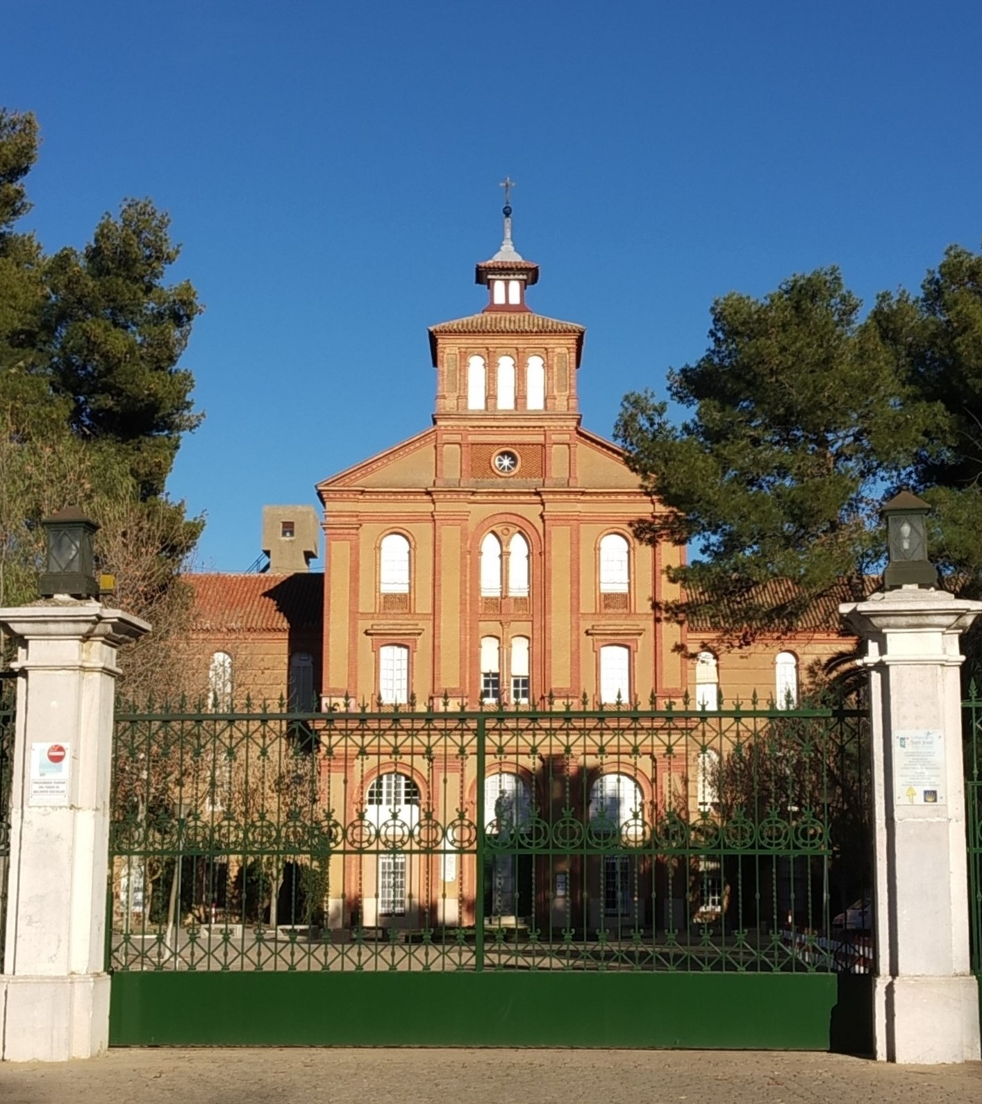 Fachada principal del Colegio San José de Villafranca de los Barros (Compañía de Jesús)